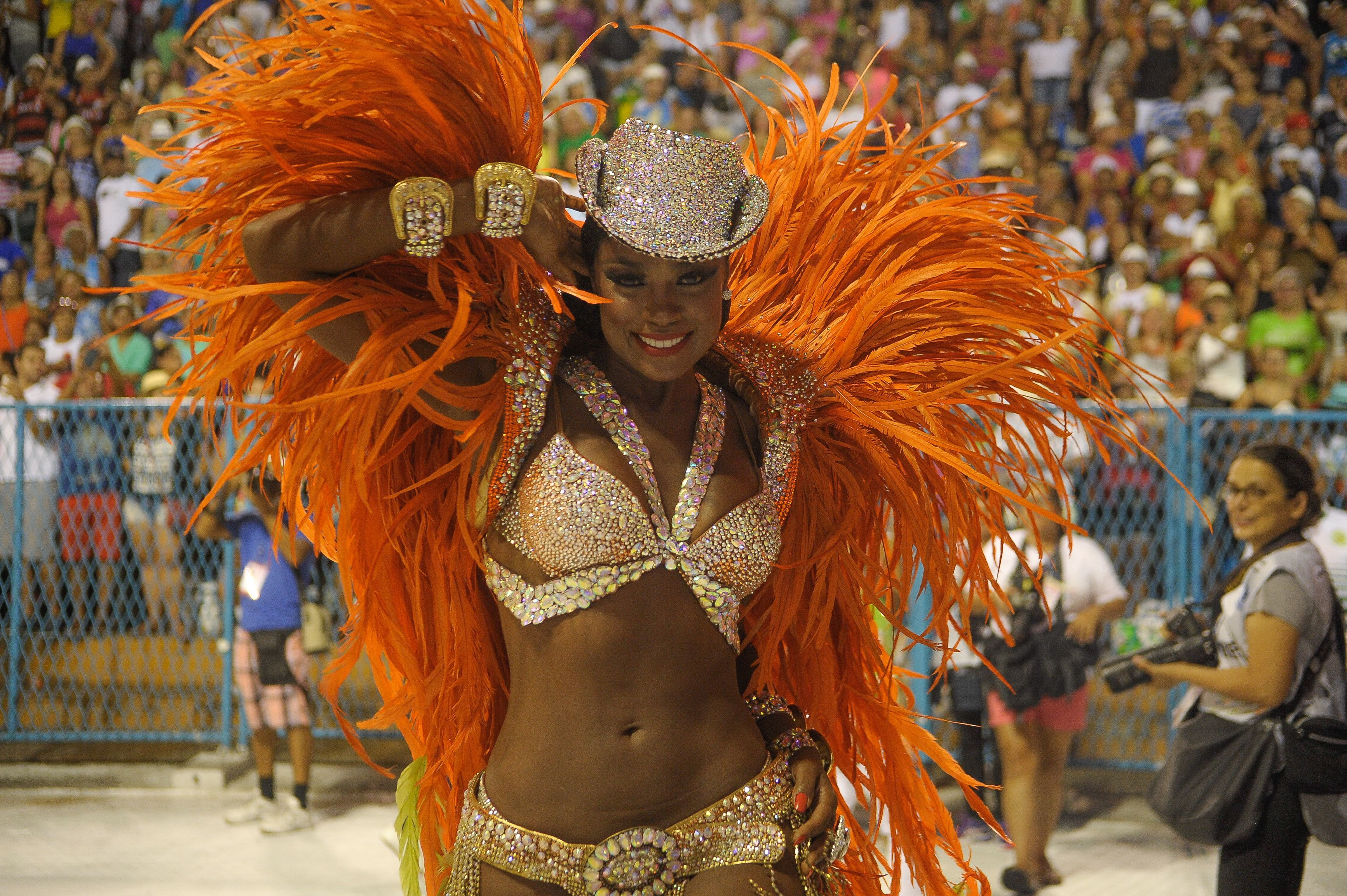 Imperatriz Leopoldinense abre o Desfile das Campeãs no Rio (Tomaz Silva/Agência Brasil)